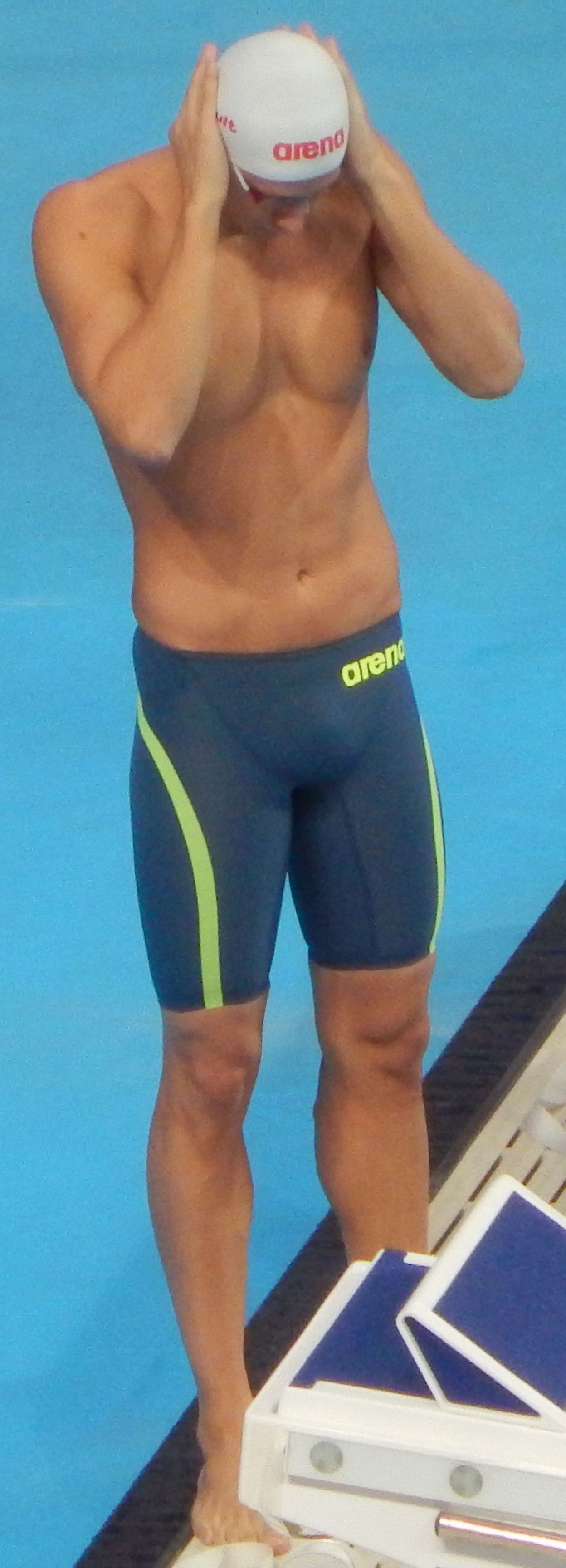 Александр Сухоруков перед стартом финала 100 метров в/с в Казани